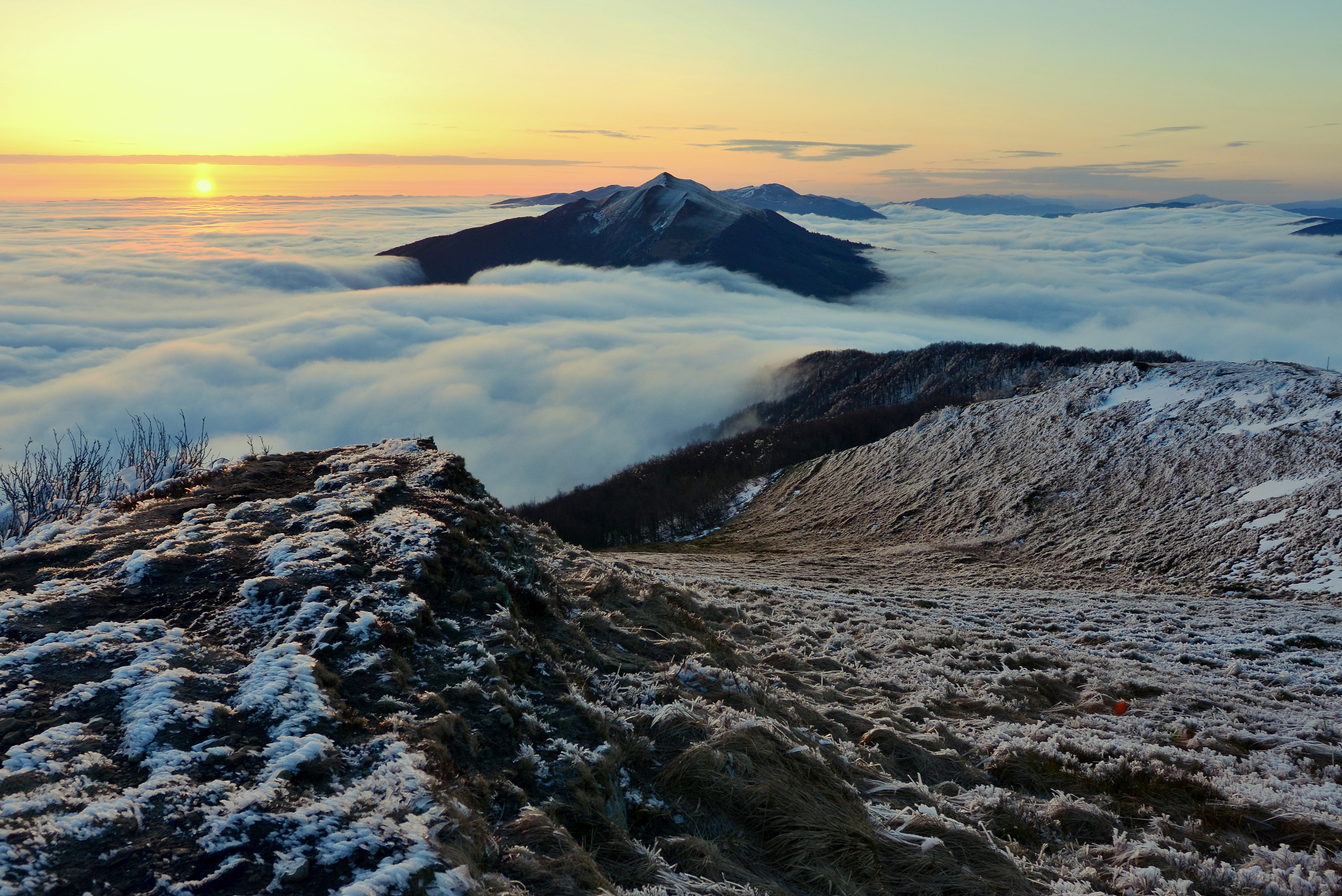 Obszar specjalnej ochrony ptaków Bieszczady. This is a photography of Natura 2000 protected area with ID PLC180001